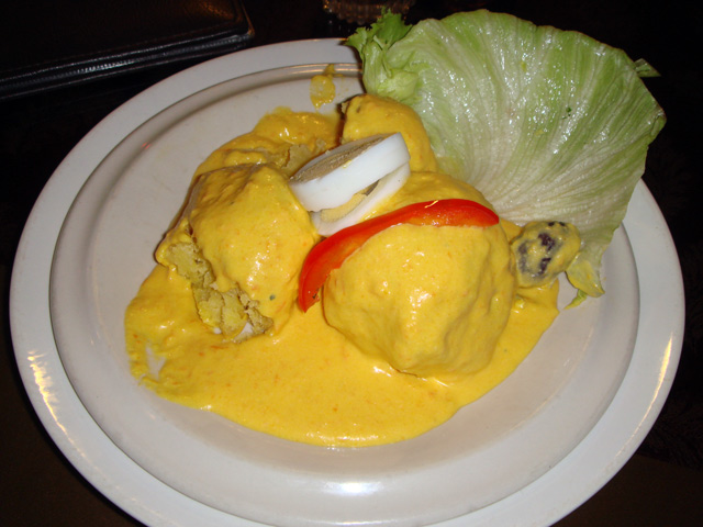 Papa a la huancaína. Gastronomía del Perú